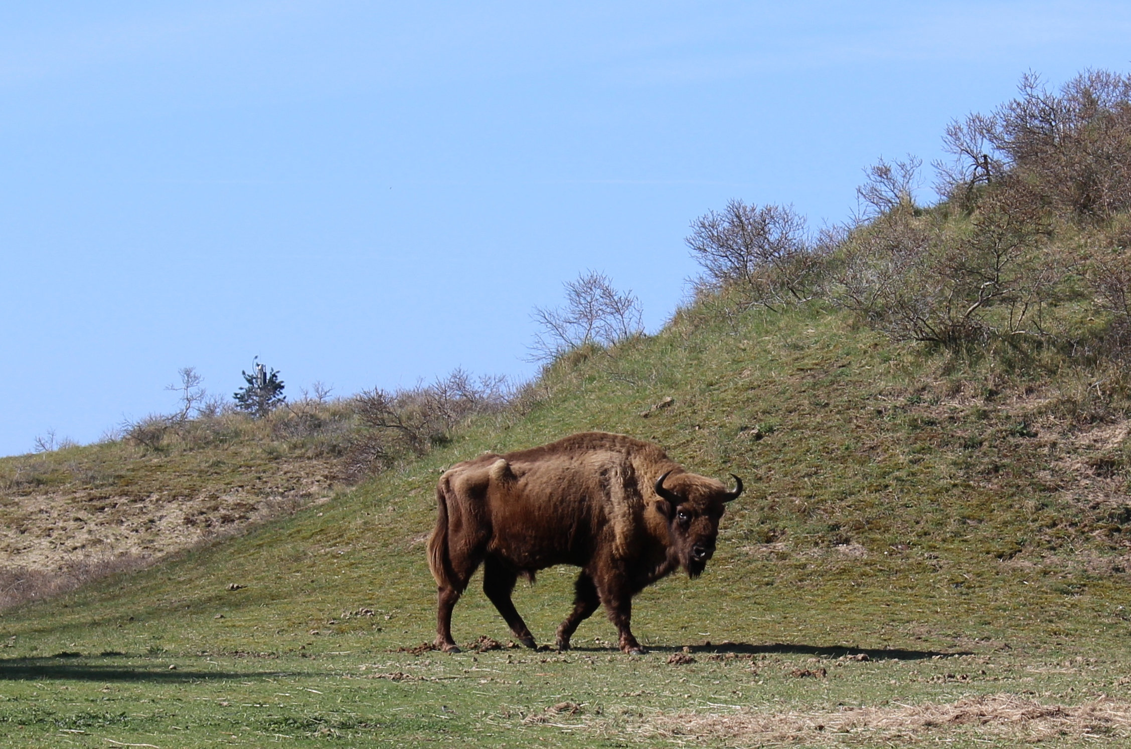 Wisentstier in Nationaal Park Zuid-Kennemerland gelegen in de provincie Noord-Holland in het noord-westen van Nederland